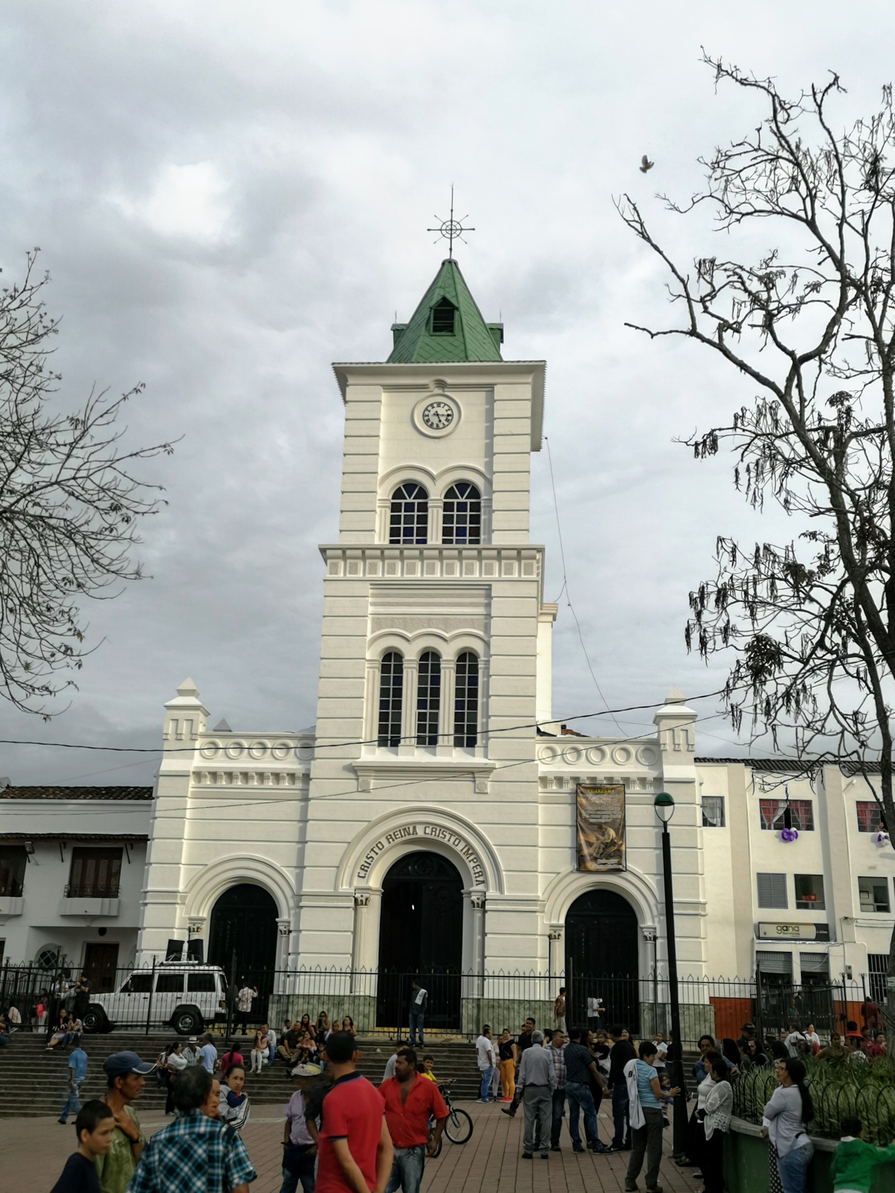 Iglesia de Santa Bárbara, Santa Bárbara, Antioquia, Colombia. 2019